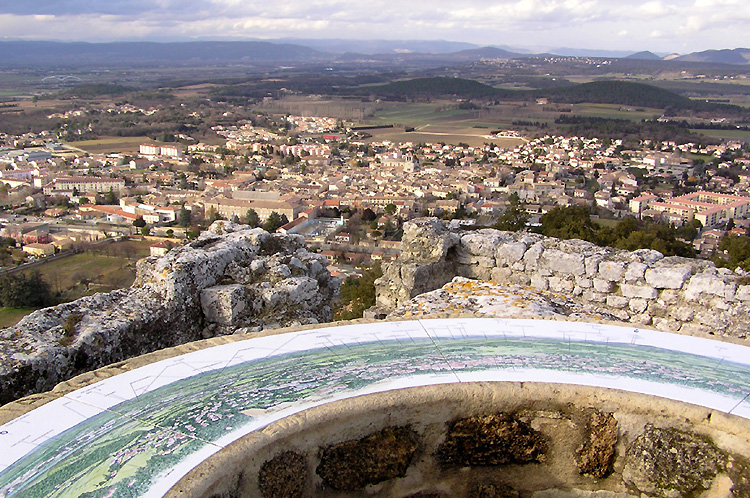 Vue générale de Saint-Paul-Trois-Châteaux depuis la colline de la Saint-Juste (2006)